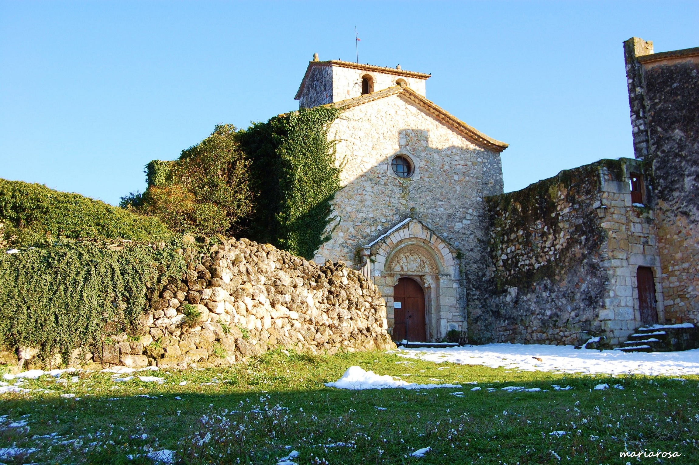 Monestir de Sant Sebastià dels Gorgs (Avinyonet del Penedès)